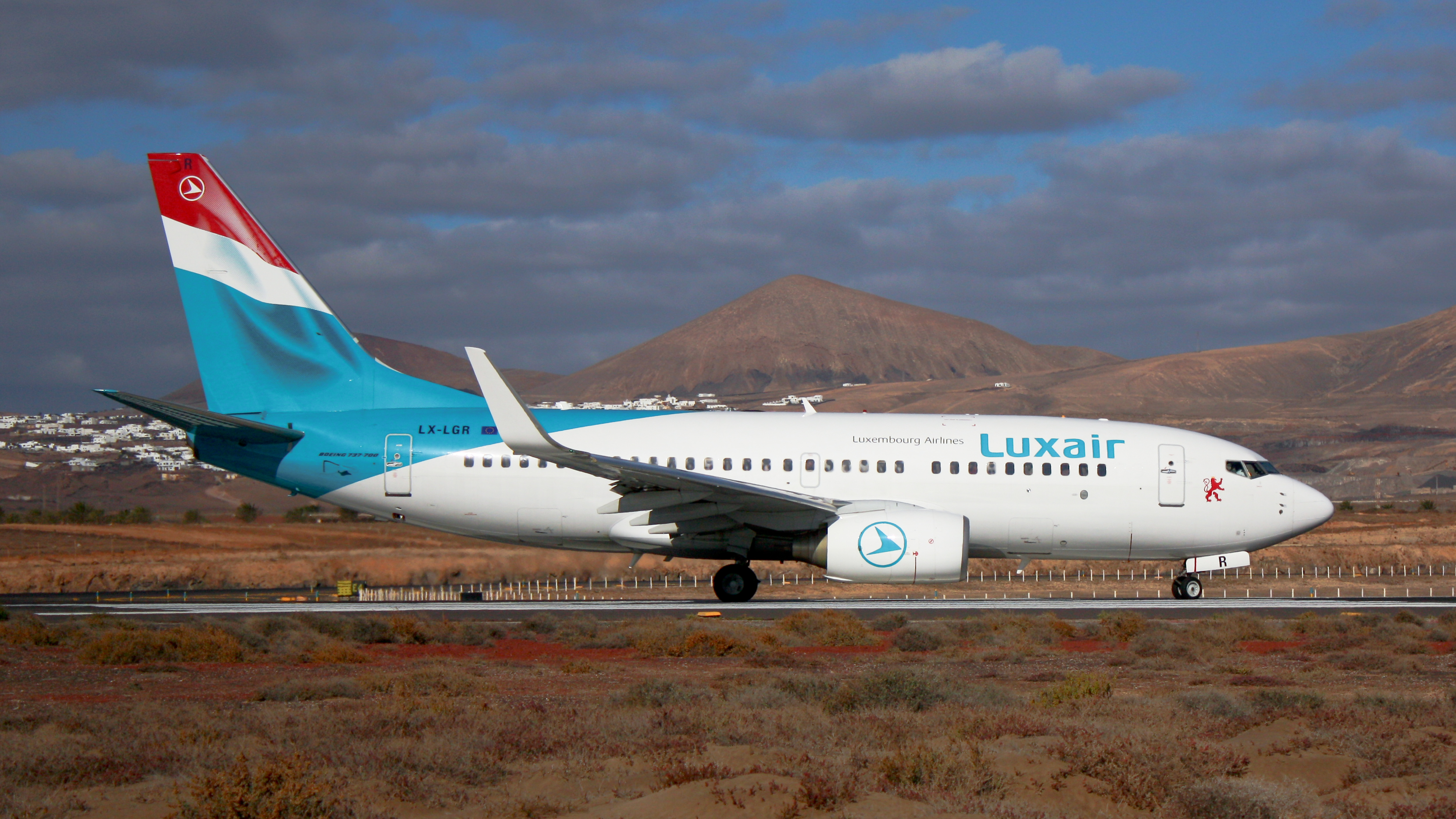 Luxair B737-700 LX-LGR